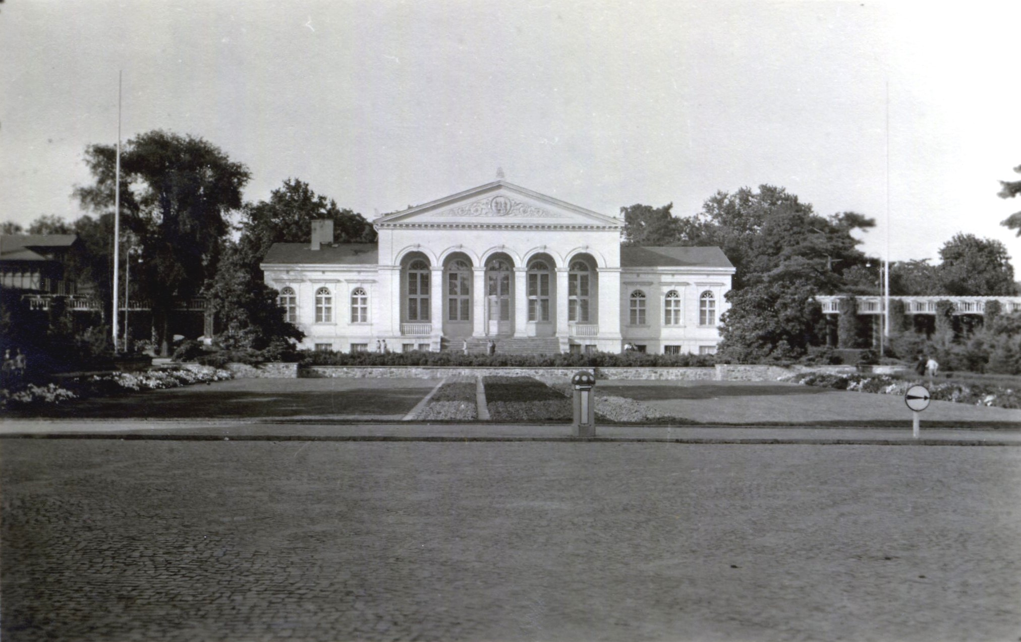 Herrenkrug in Magdeburg im Jahr 1940